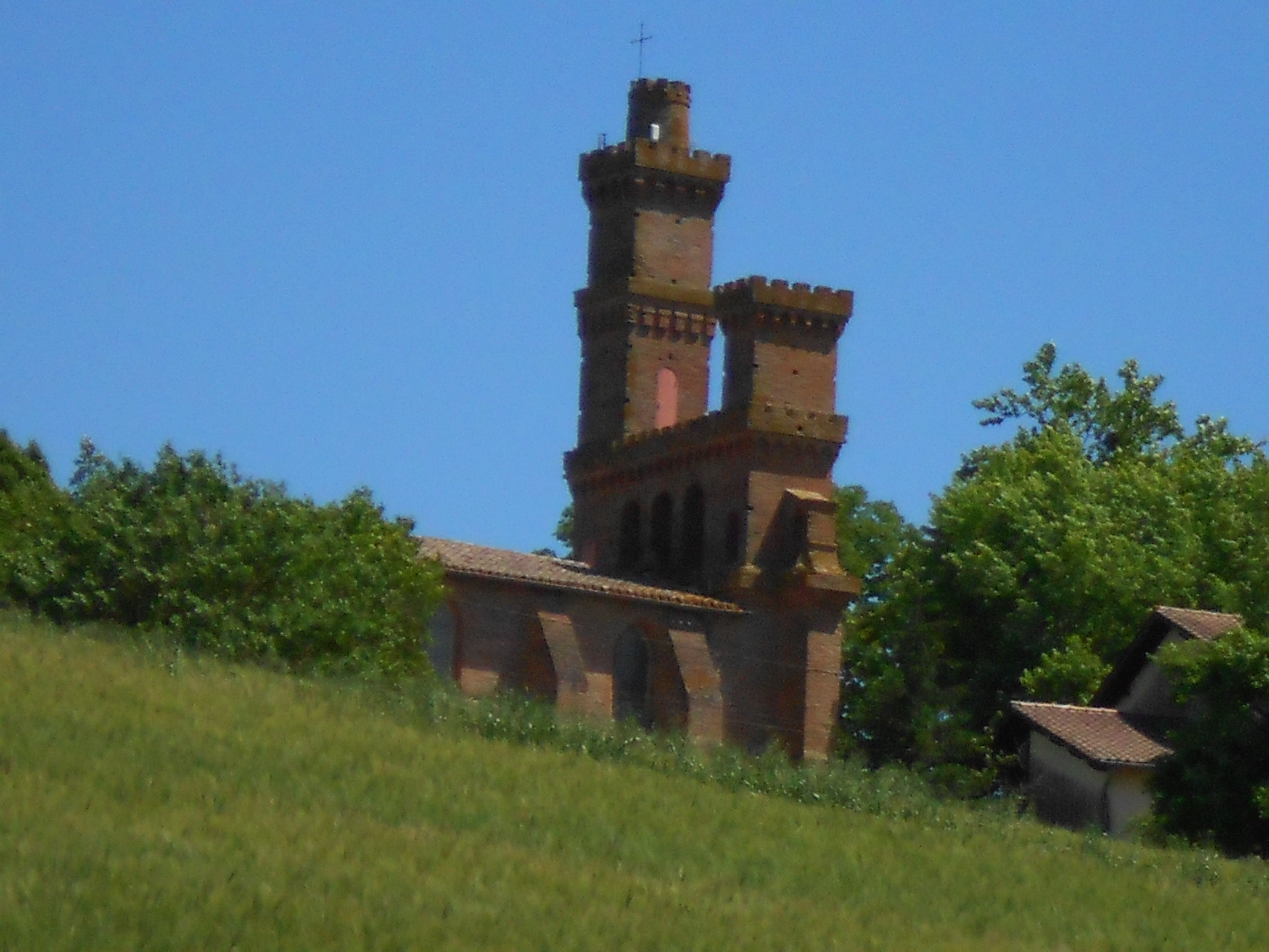 Vue de Grazac